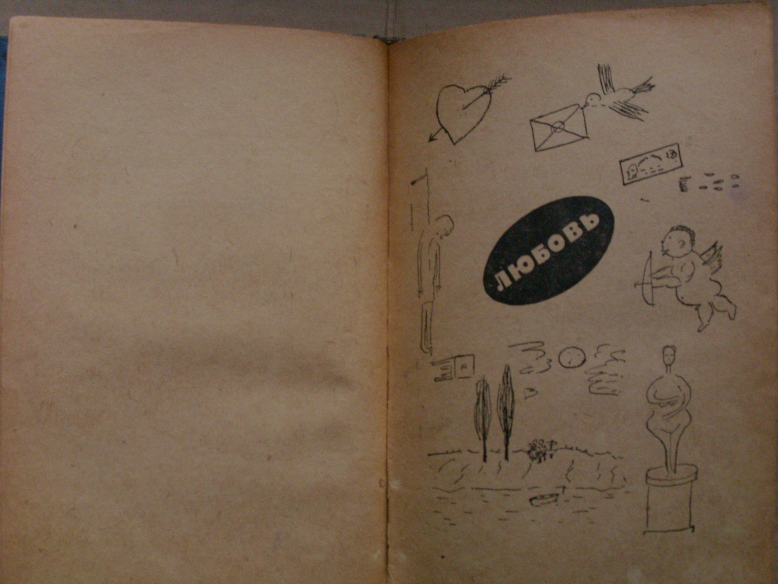 Zoschenko. Reversal Blue Book. 1935